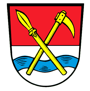 Wappen von Grafrath, Landkreis Fürstenfeldbruck, Oberbayern